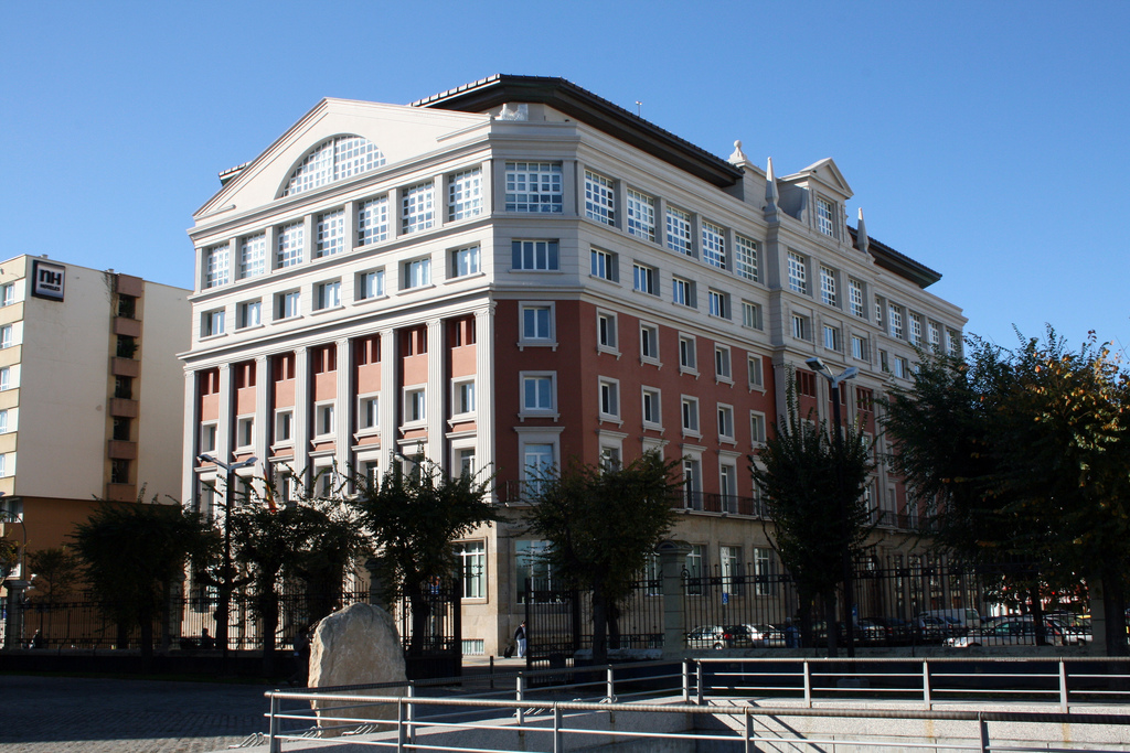 Deputación Provincial da Coruña. Edificio